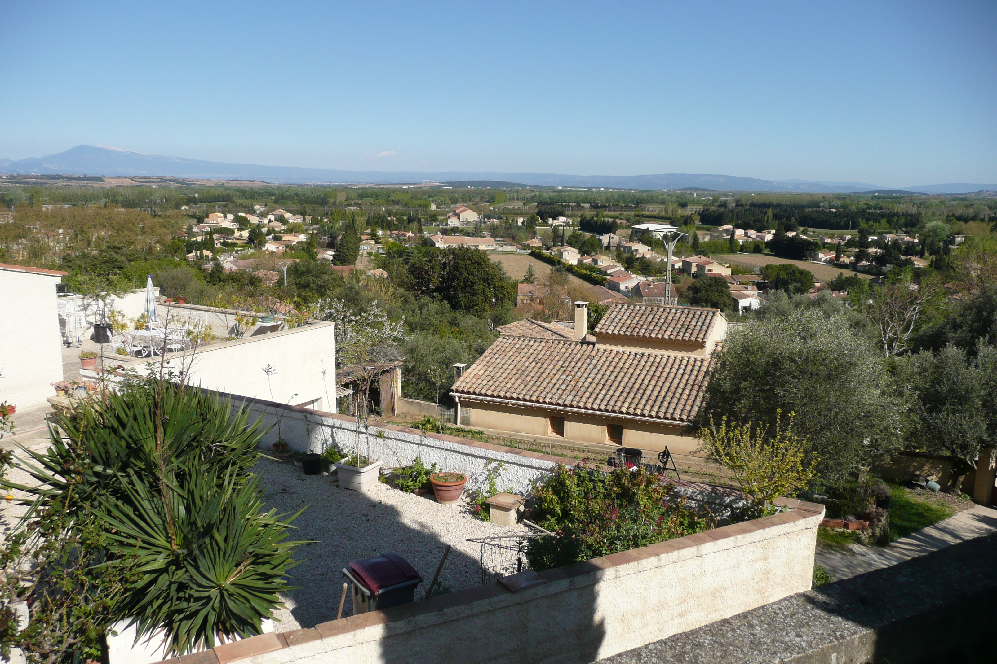 Vue sur Sauveterre, à gauche le Mont Ventoux.